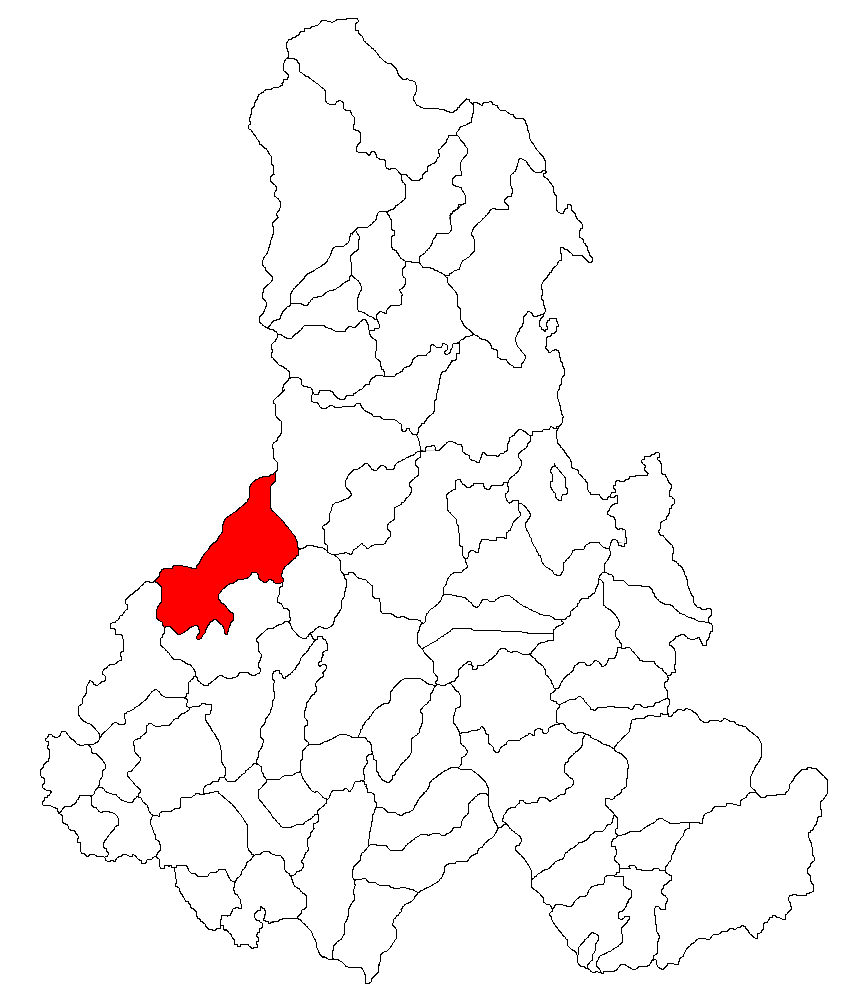 Categorie:Hărţi ale judeţului Harghita Contents 1 Licensing 2 Sursă 3 Licensing 4 Original upload log Licensing Sursă ro::Imagine:Harta_jud_Harghita.png